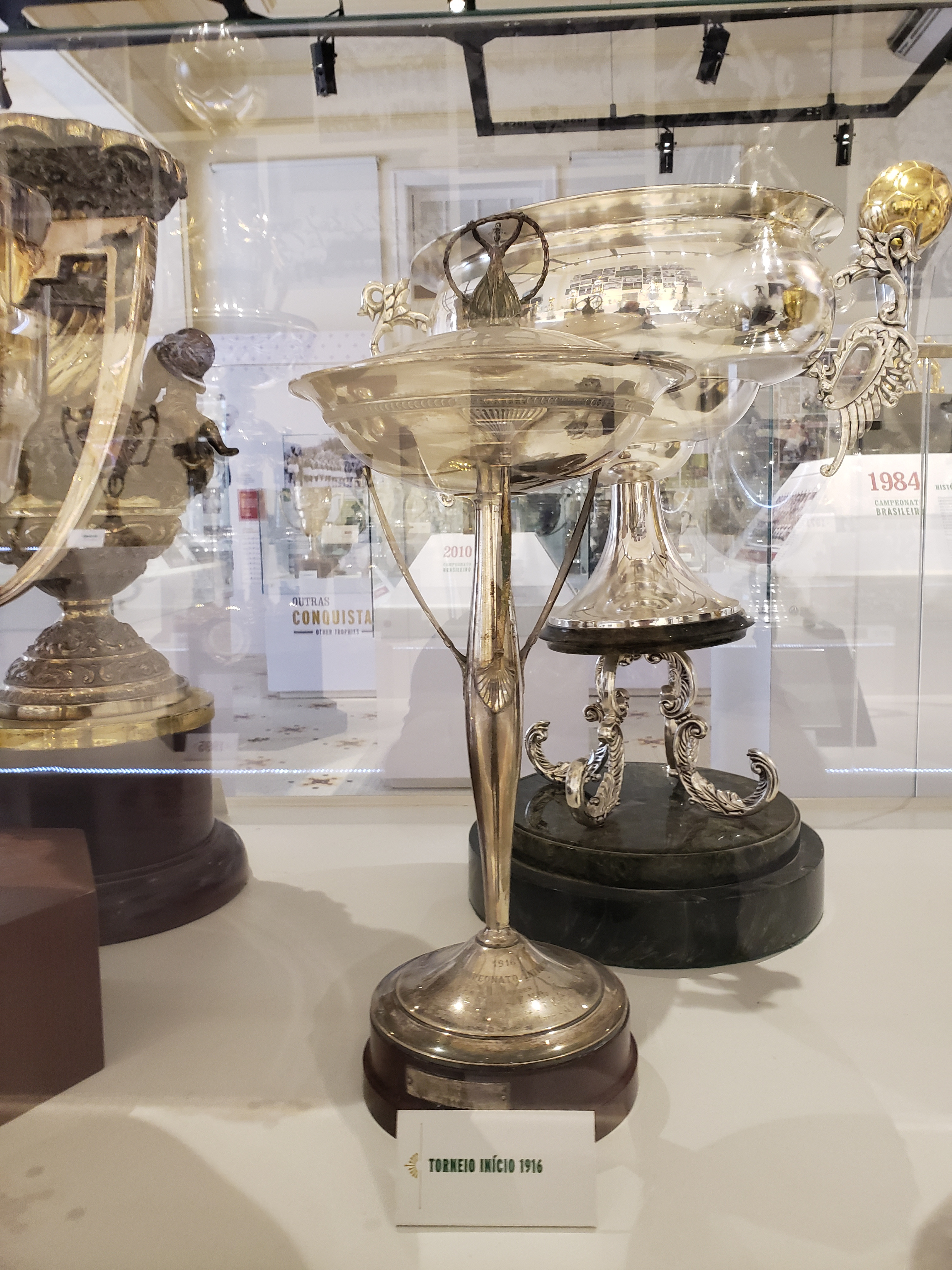 Torneio Início do Campeonato Carioca de 1916 conquistado pelo Fluminense Footbal Club.